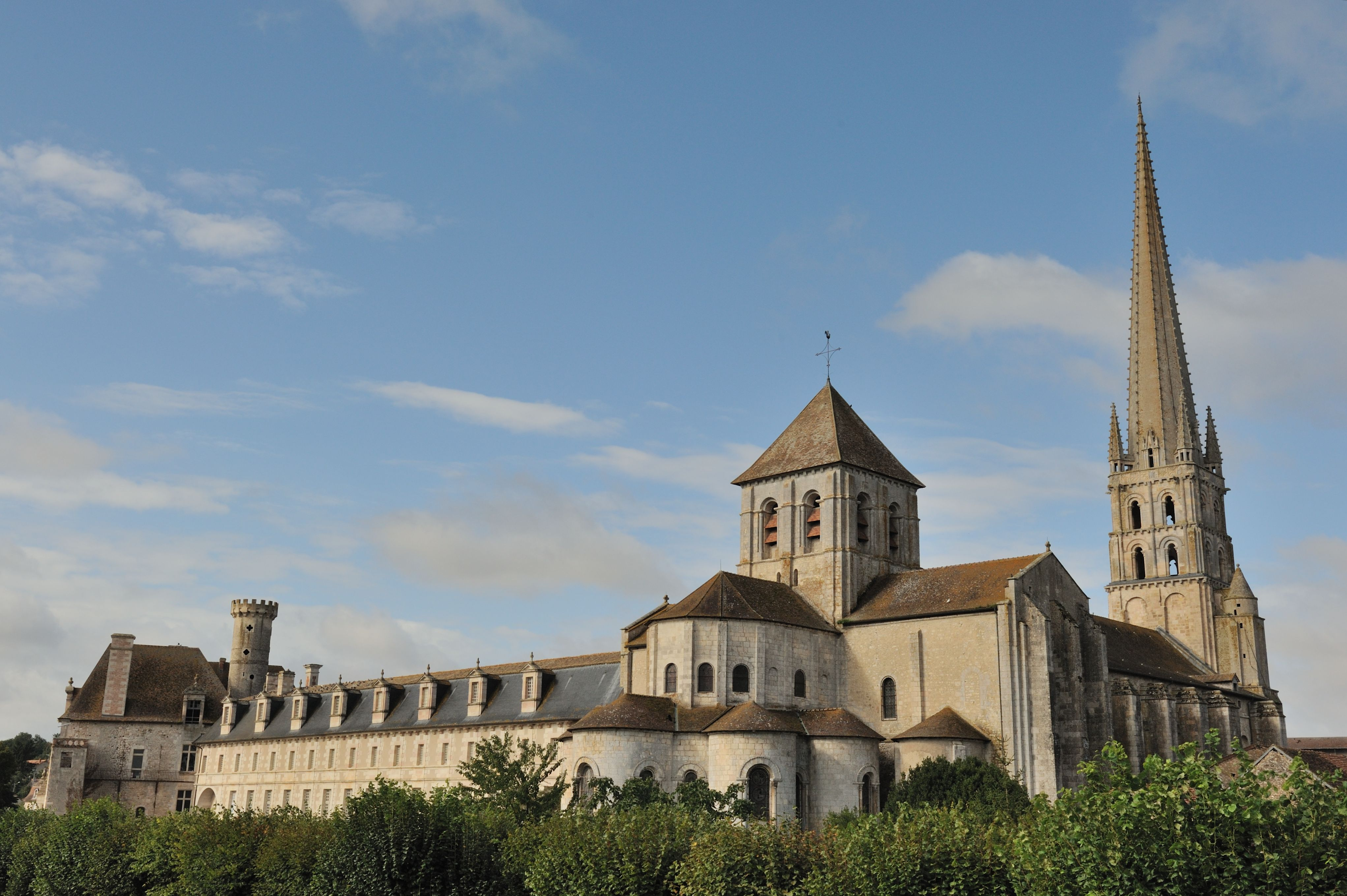 Vue depuis le pont sur la Gartempe .